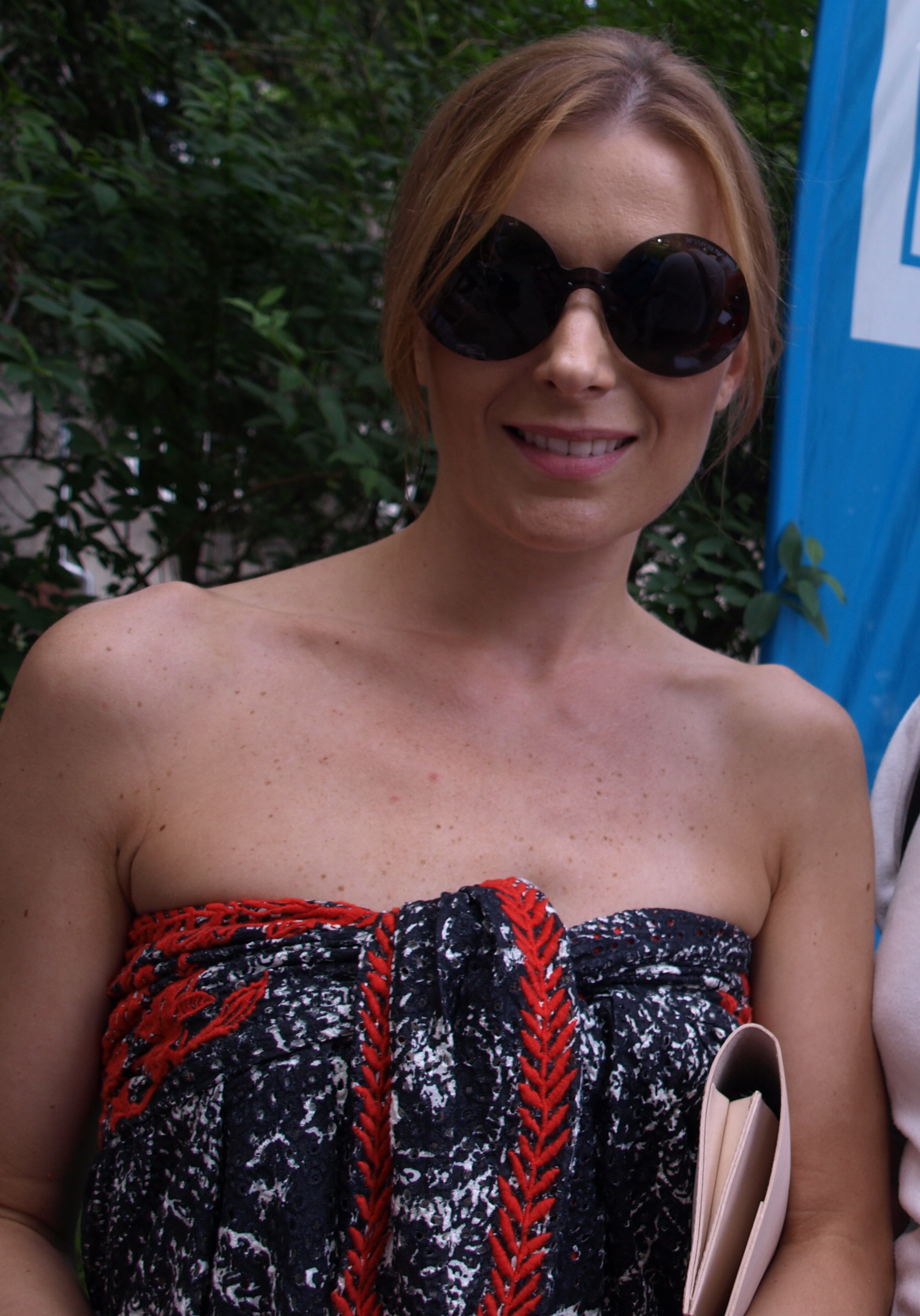 Halina Mlynková, piosenkarka.